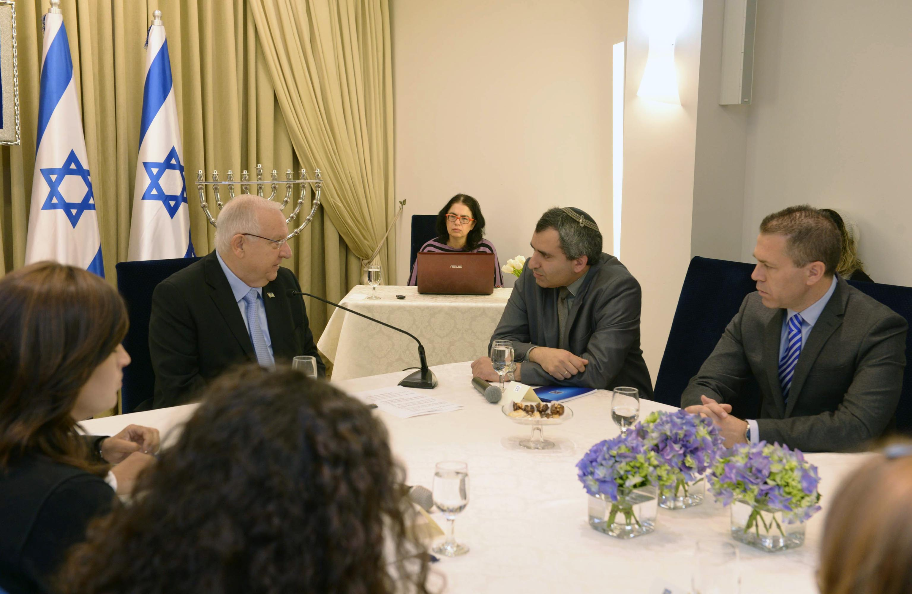 נשיא מדינת ישראל ראובן ריבלין פותח בהתייעצויות עם המפלגות השונות לקראת הרכבת הממשלה לאחר בחירות מרץ 2015 עם הליכוד